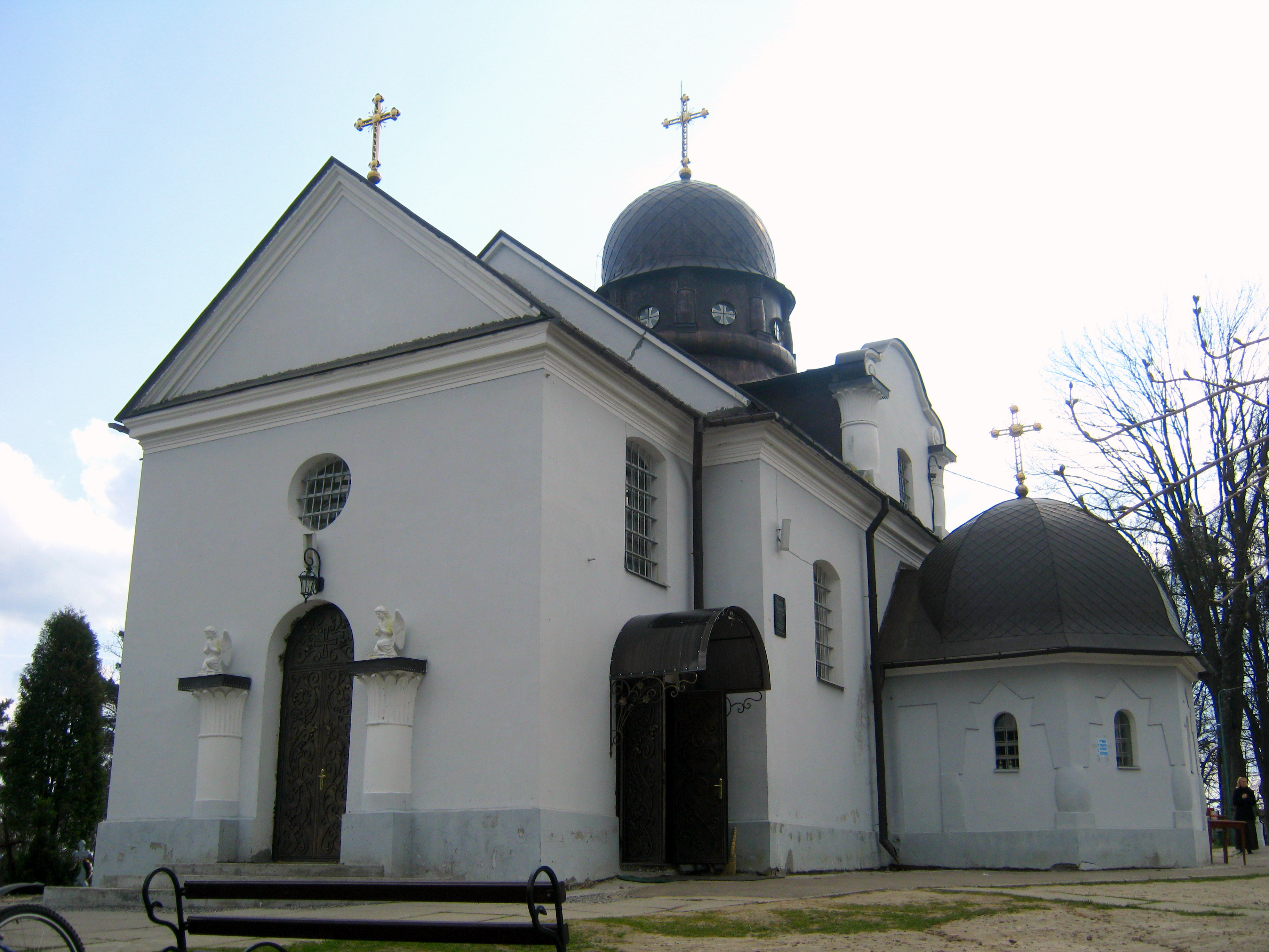 Церква в селі Страдч, Яворівського району Львівської області